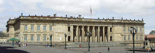 Capitolio Nacional en Bogotá Colombia, (croped version).